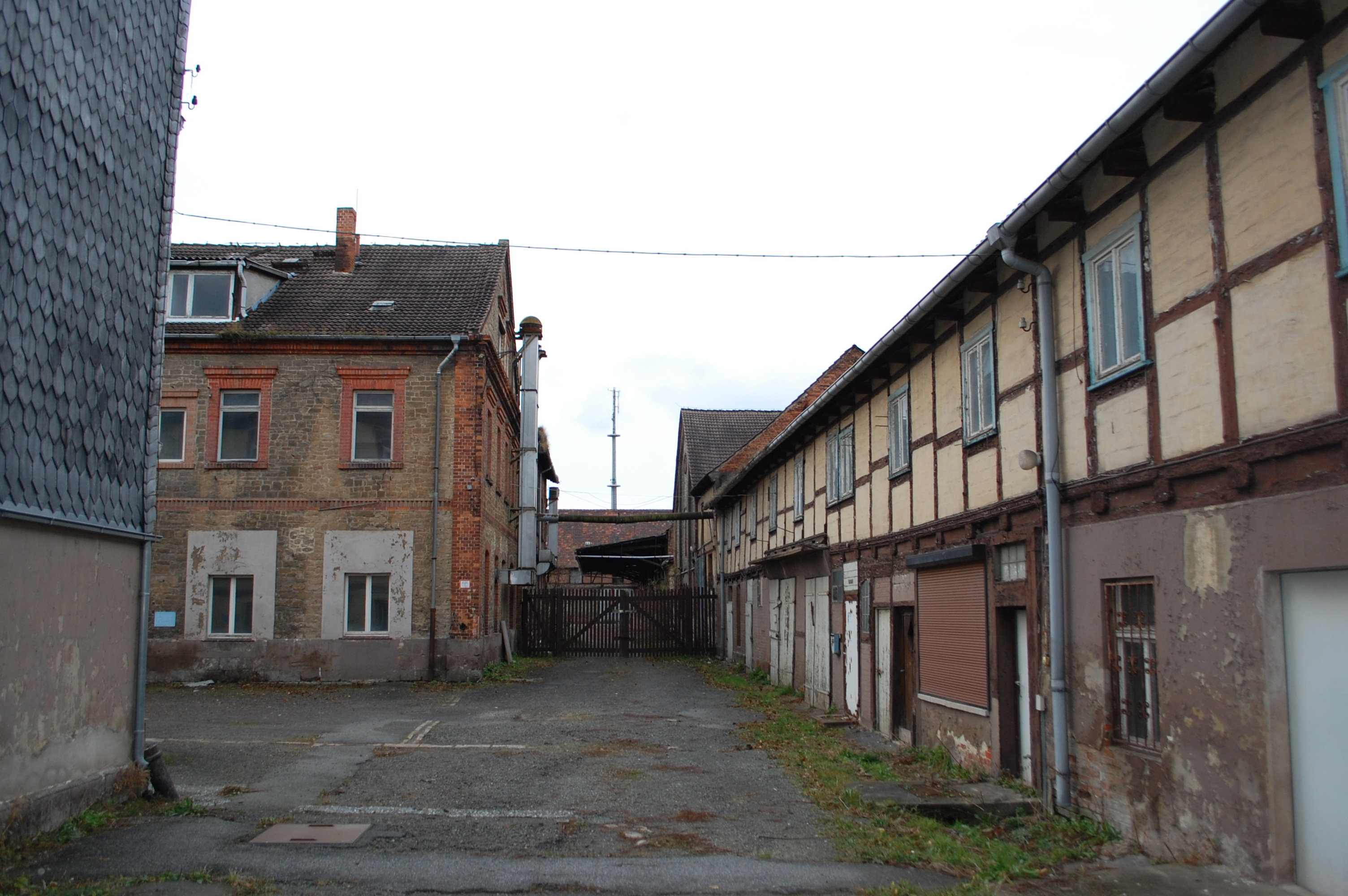 Hof Badeborner Weg 4